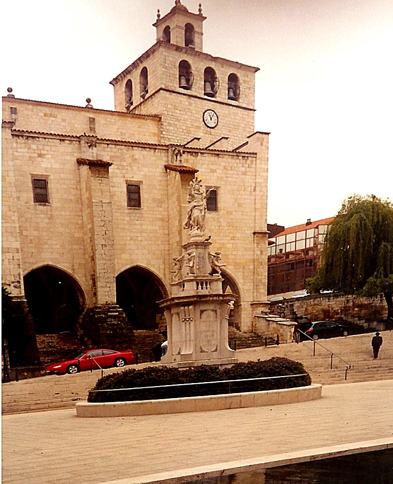 Historesch Kiirch zu Santander.